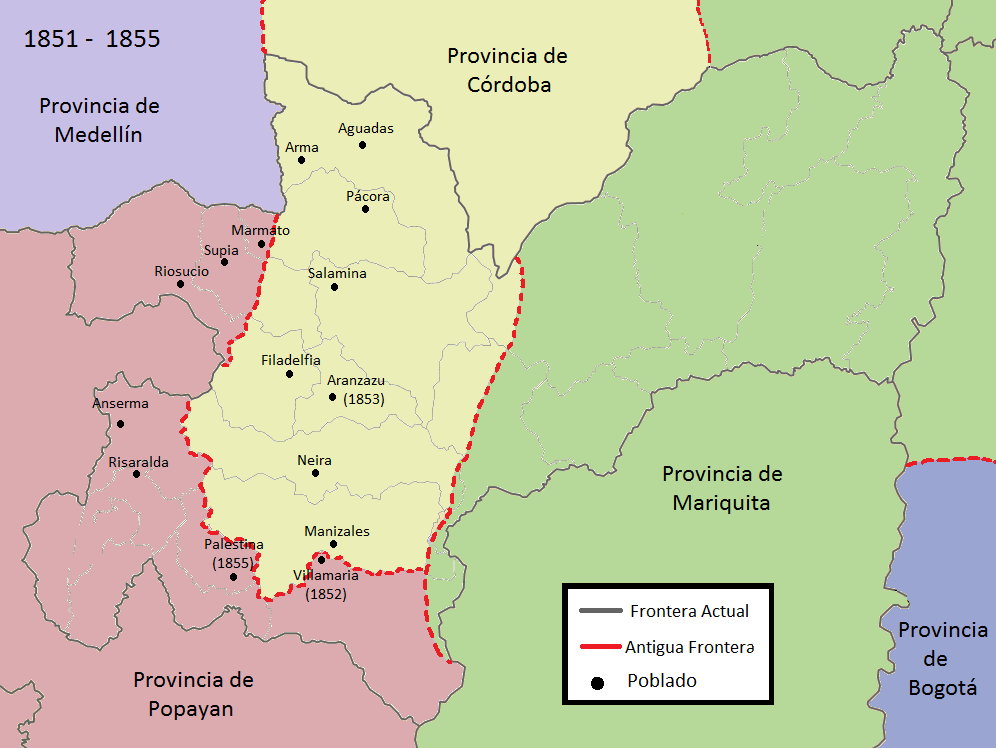 Caldas entre 1851 a 1855